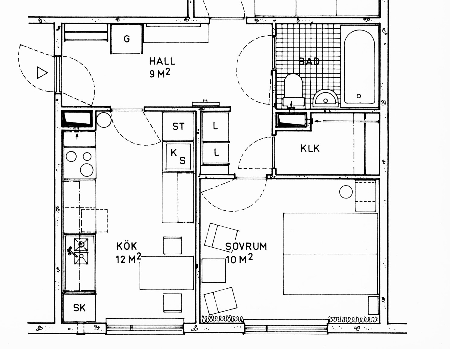 Planritning av ett svenskt standardkök för en bostad på 2 r.o.k med storlek 68 m2